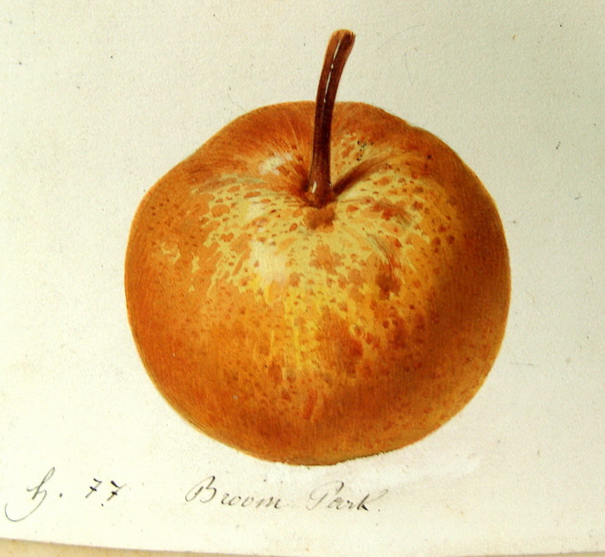 BroomPark, poire.